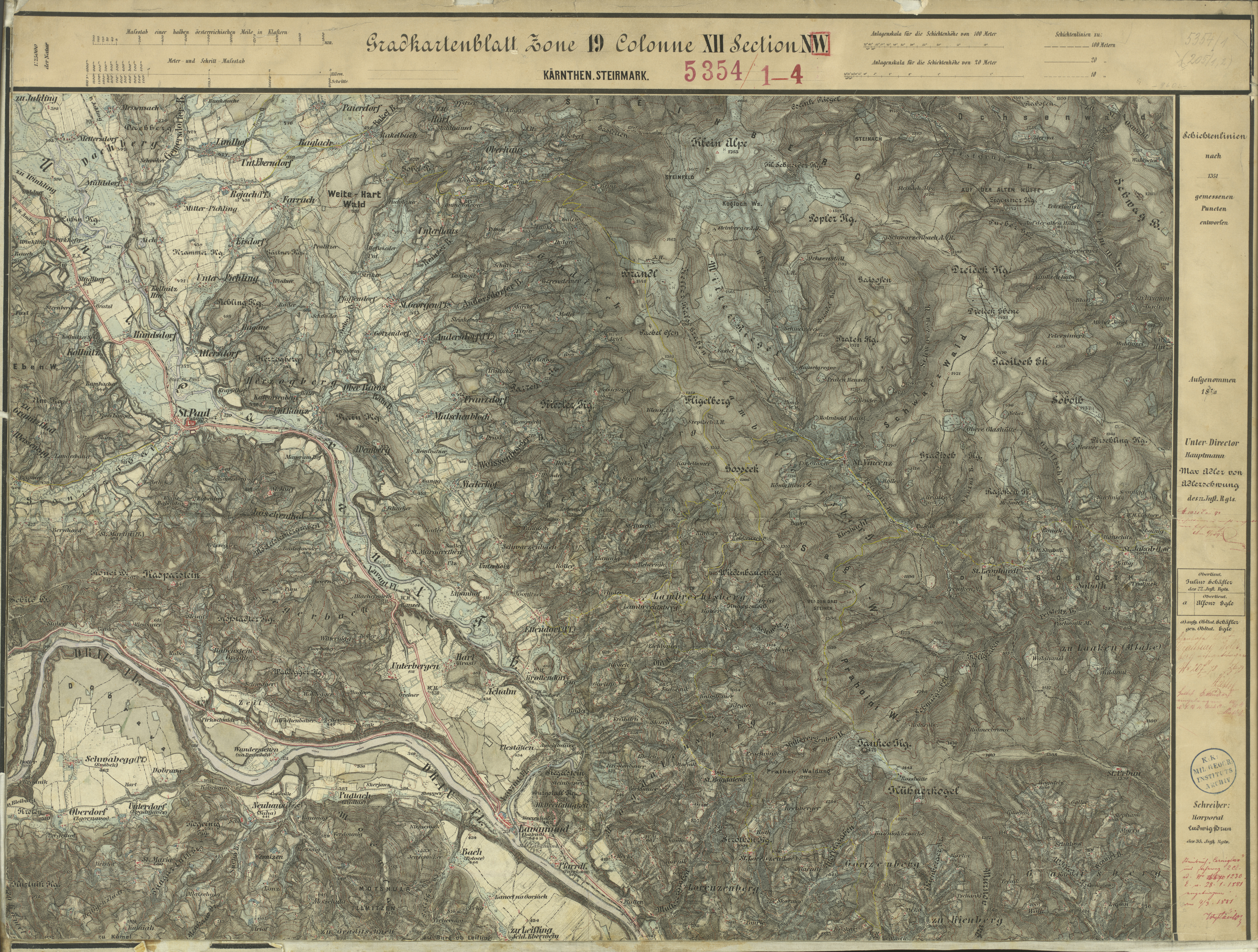 historische Landkarte: Gradkartenblatt Zone 19 Colonne XII Section NW (später 5354/1). Franzisco-josephinische (3.) Landesaufnahme der österreichisch-ungarischen Monarchie. Aufnahmeblatt 1:25.000. Aufgenommen 1877/78, Lavamünd, St. Paul, Soboth